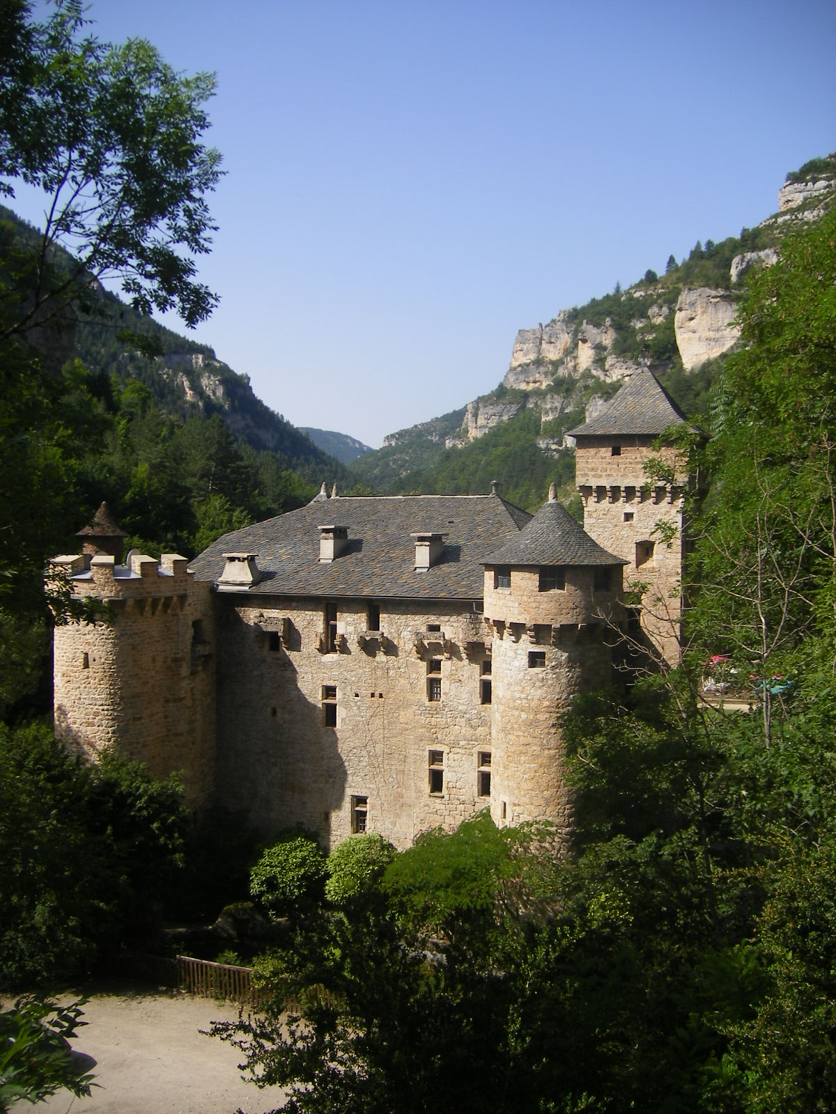 Château de la Caze (commune de Sainte-Énimie)